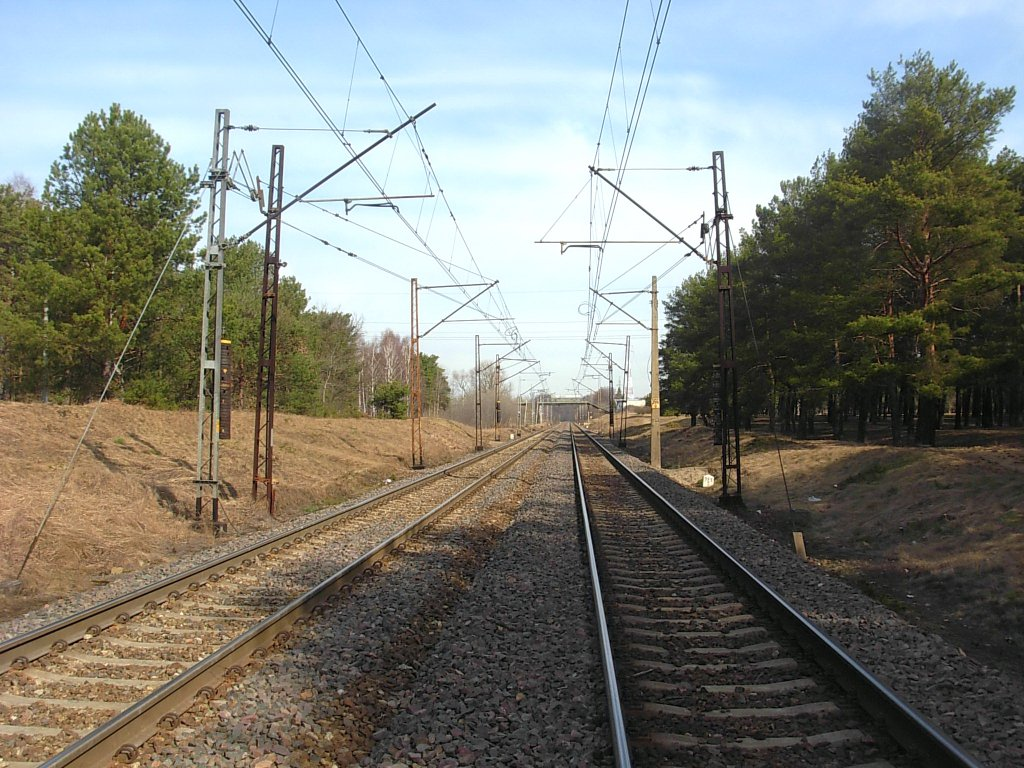 Linia kolejowa nr 131 Bydgoszcz-Inowrocław na os. Jaru-Miedzyń w Bydgoszczy